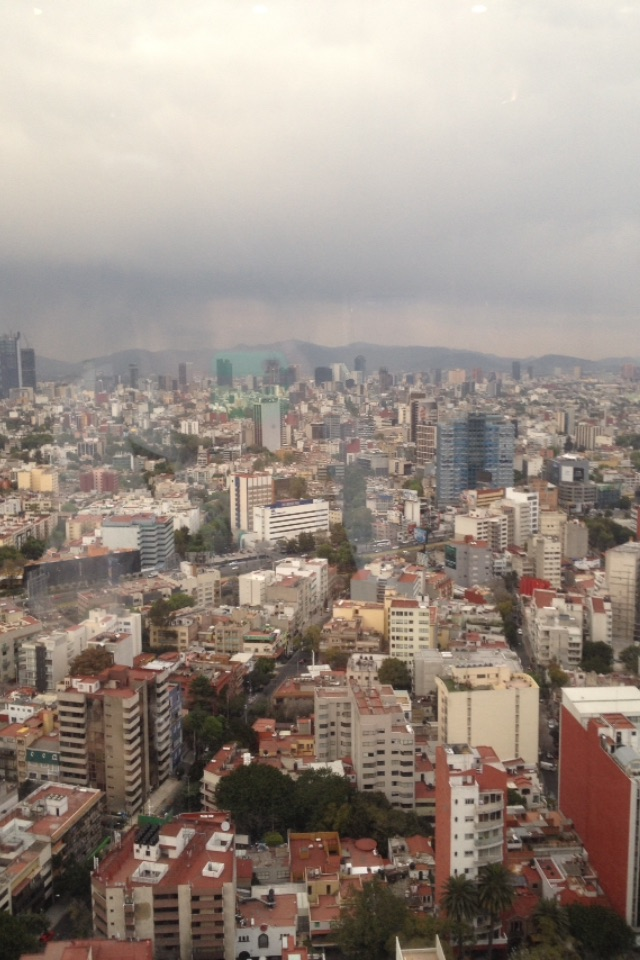 Vista de la Ciudad de México desde el World Trade Center